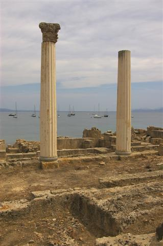 Colonnes_corinthiennes_à_Tharros